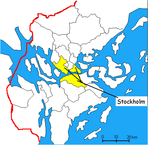 Stockholm in Sweden. The border marks the line of Stockholm County (Stockholms Län).